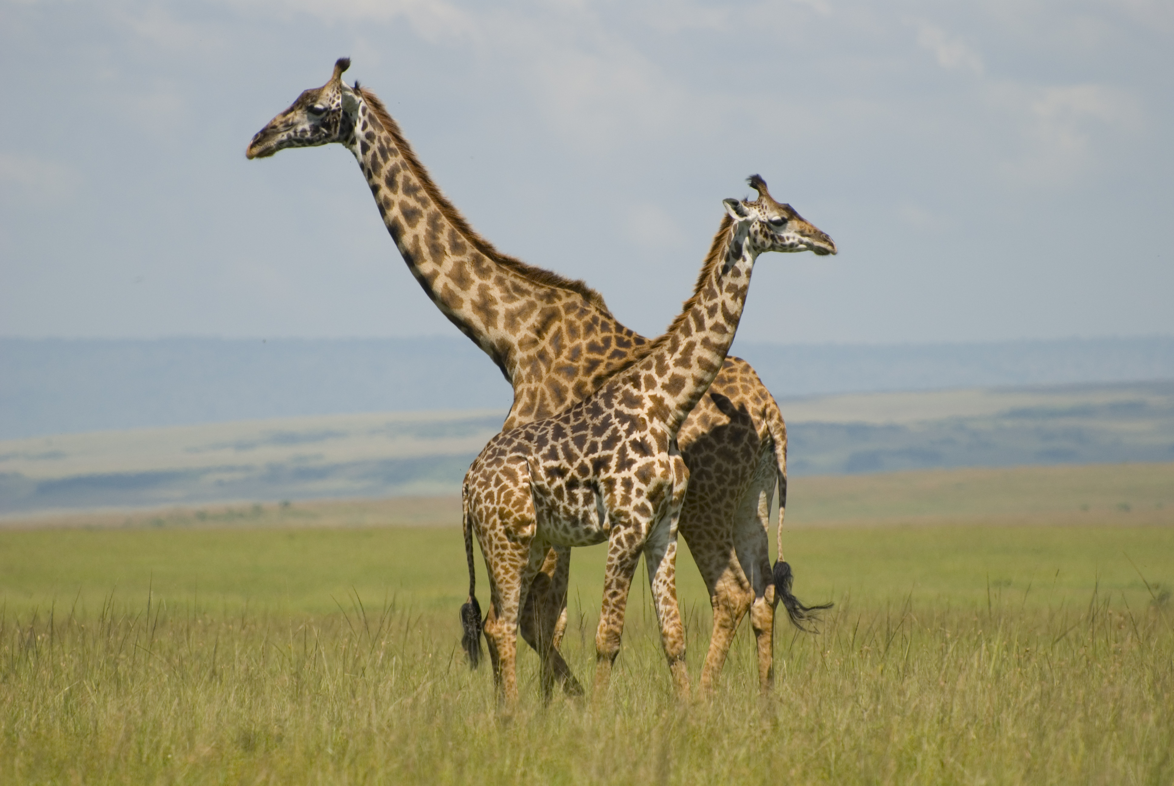 Giraffes (Giraffa camelopardalis), Masai Mara, Kenya